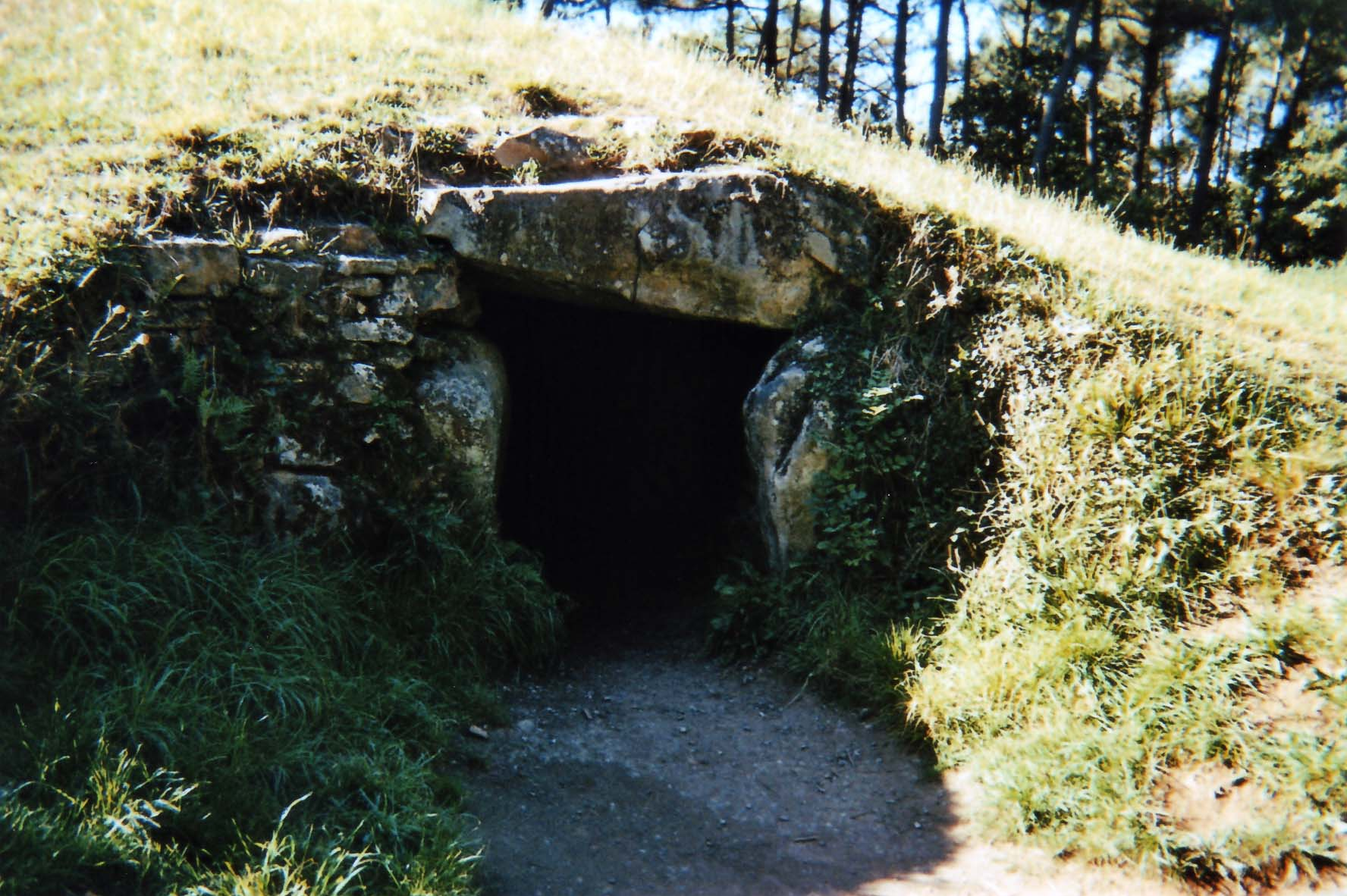 Le Bono (Morbihan, Bretagne) : entrée du tumulus